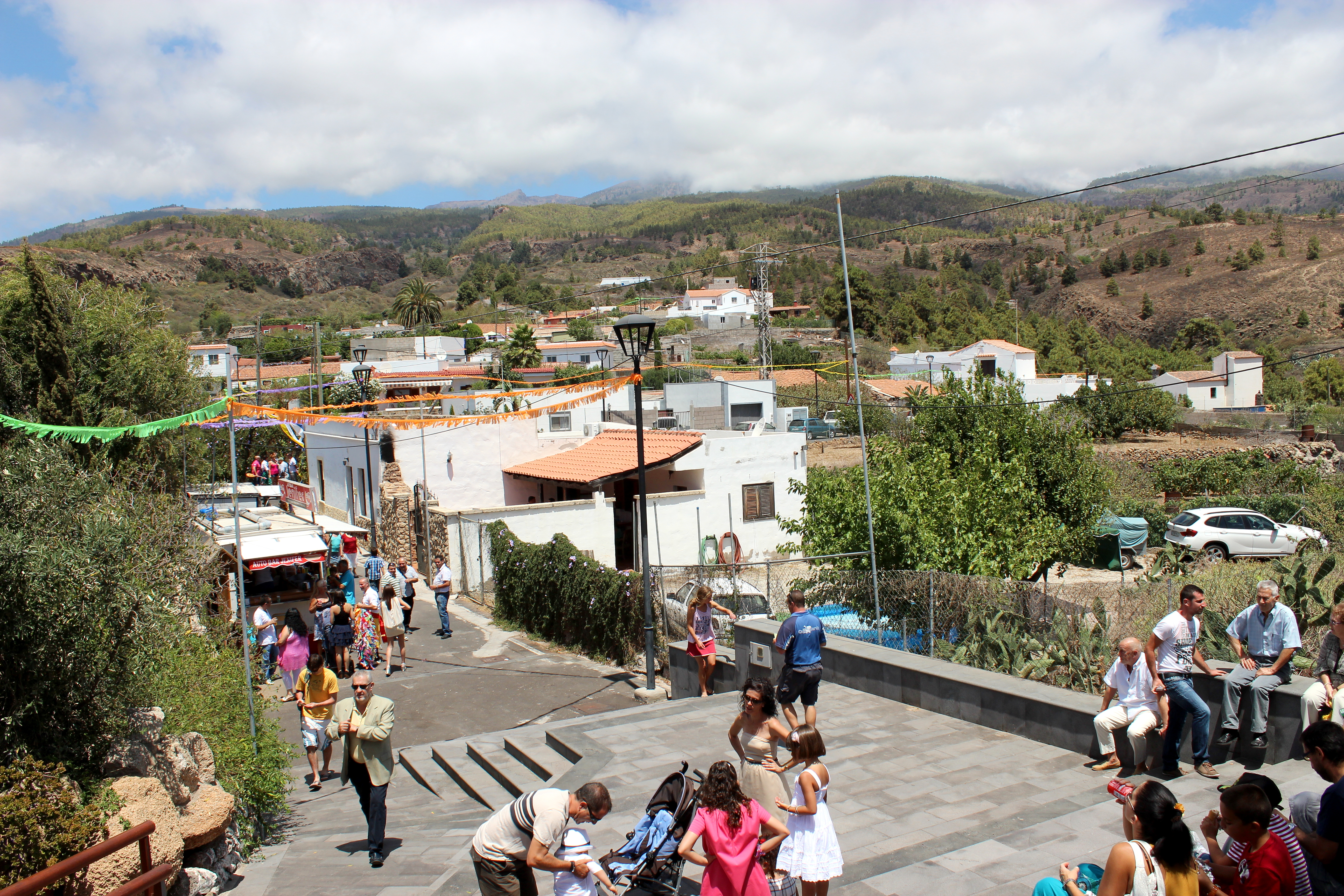 Vista del barrio de Las Vegas en Granadilla de Abona durante sus fiestas en 2012